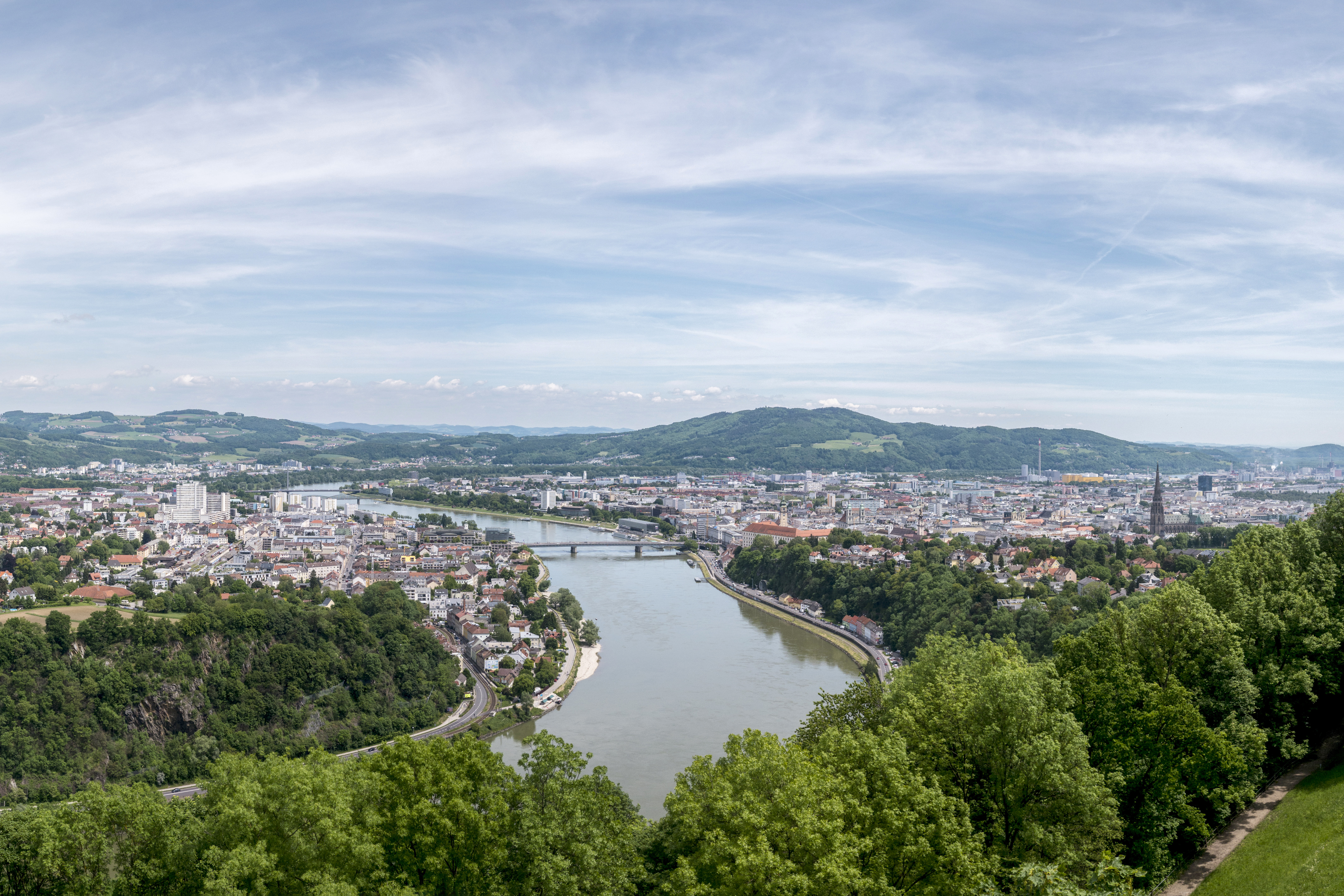 Blick über Linz von der Franz-Josefs-Warte